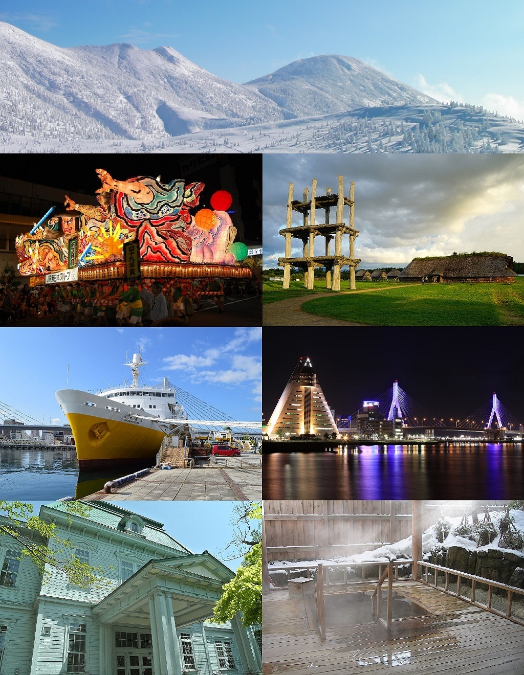 青森県青森市のモンタージュ画像